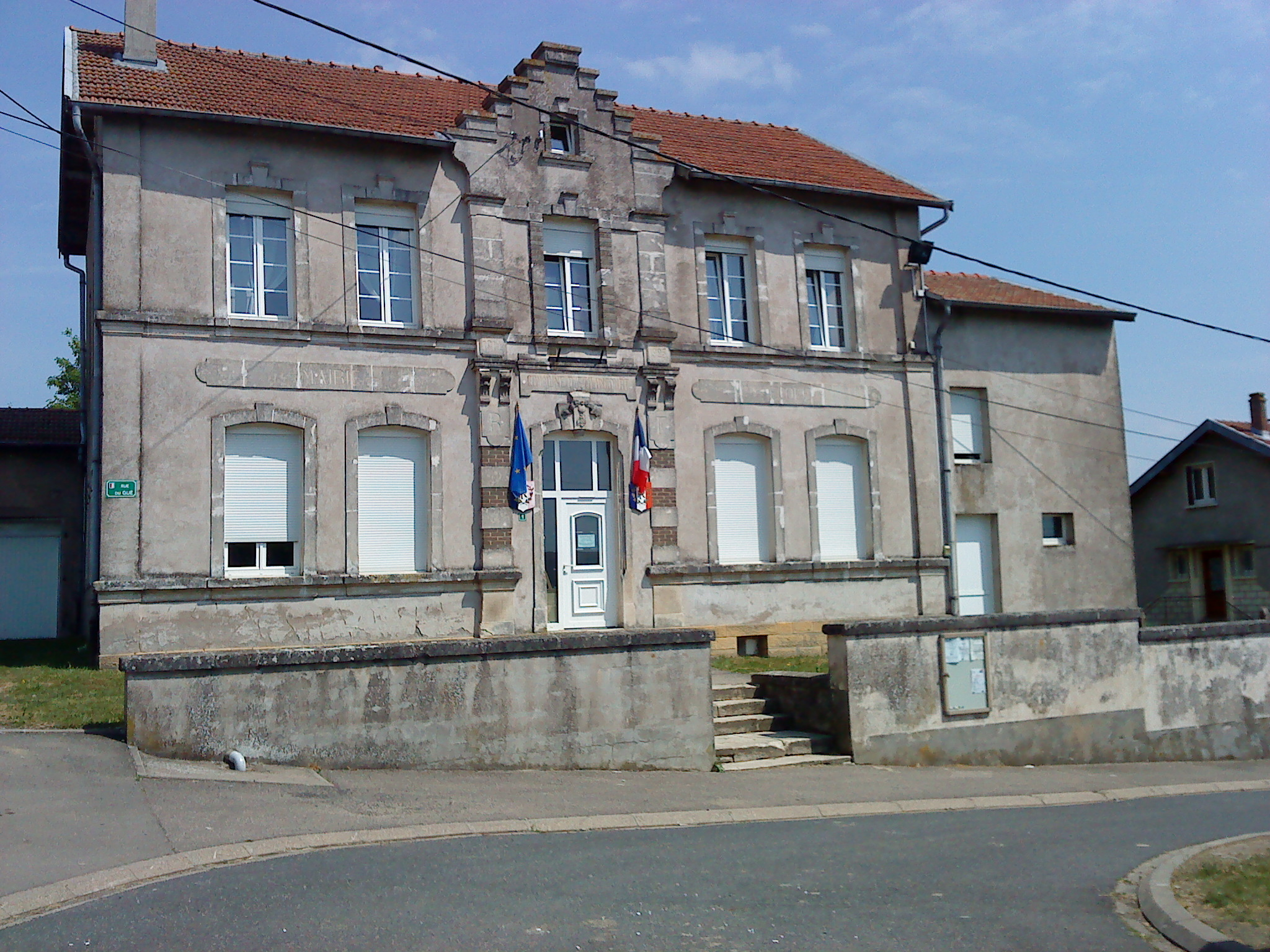 La mairie de Attilloncourt, commune du département de la Moselle et la région Lorraine.